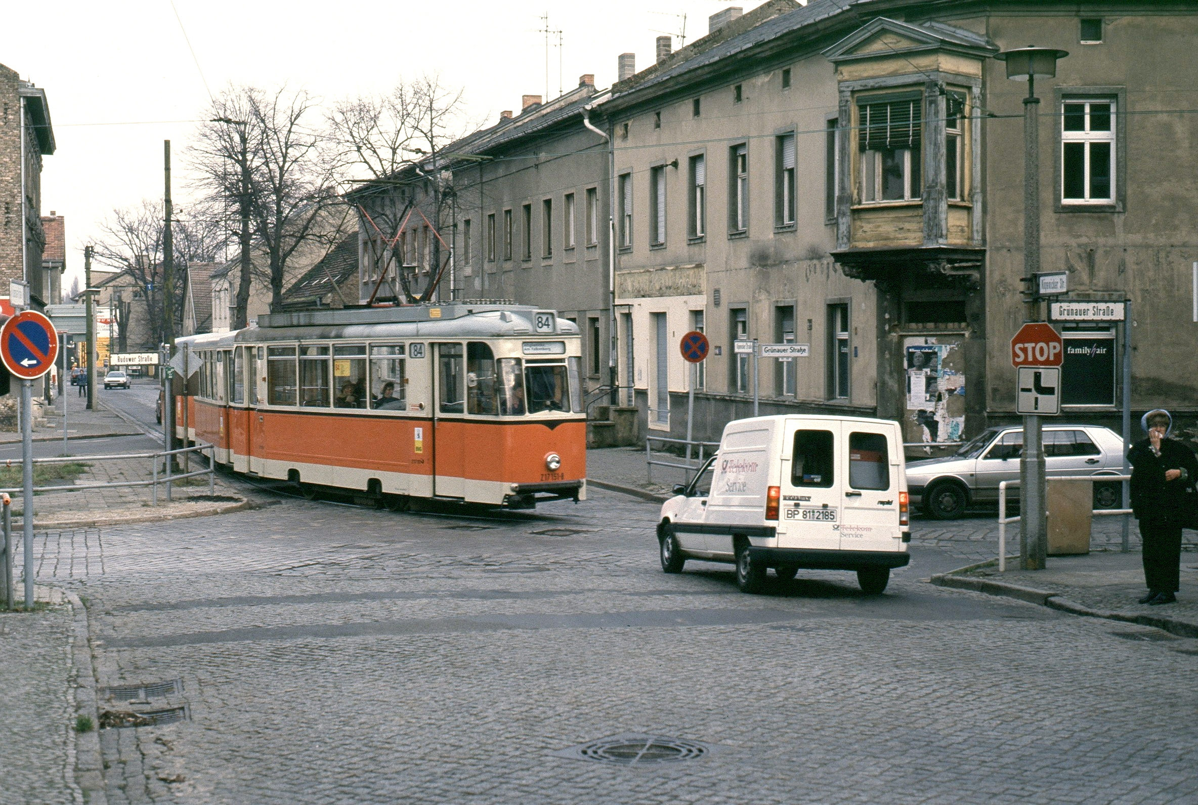 Berlin, Bezirk Treptow-Köpenick, Ortsteil Altglienicke, Kreuzung Köpenicker Str./Rudower Str./Grünauer Str., mit Straßenbahn der Linie 84 in Richtung Altglienicke, Am Falkenberg (Rekowagen Nr. 217 151 - 8) beim Linksabbiegen von der Köpenicker Straße in die Grünauer Straße